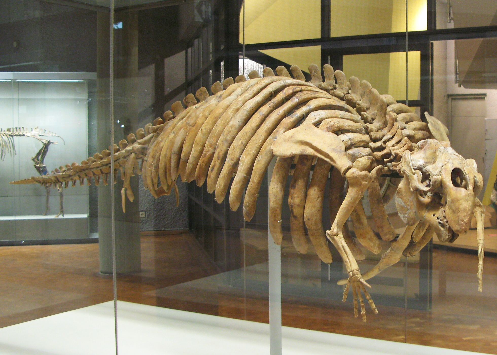 Seekuh (Halitherium)- Alttertiär/Oligozän - Flonheim (Mainzer Becken) - aufgenommen im Museum am Löwentor, Stuttgart